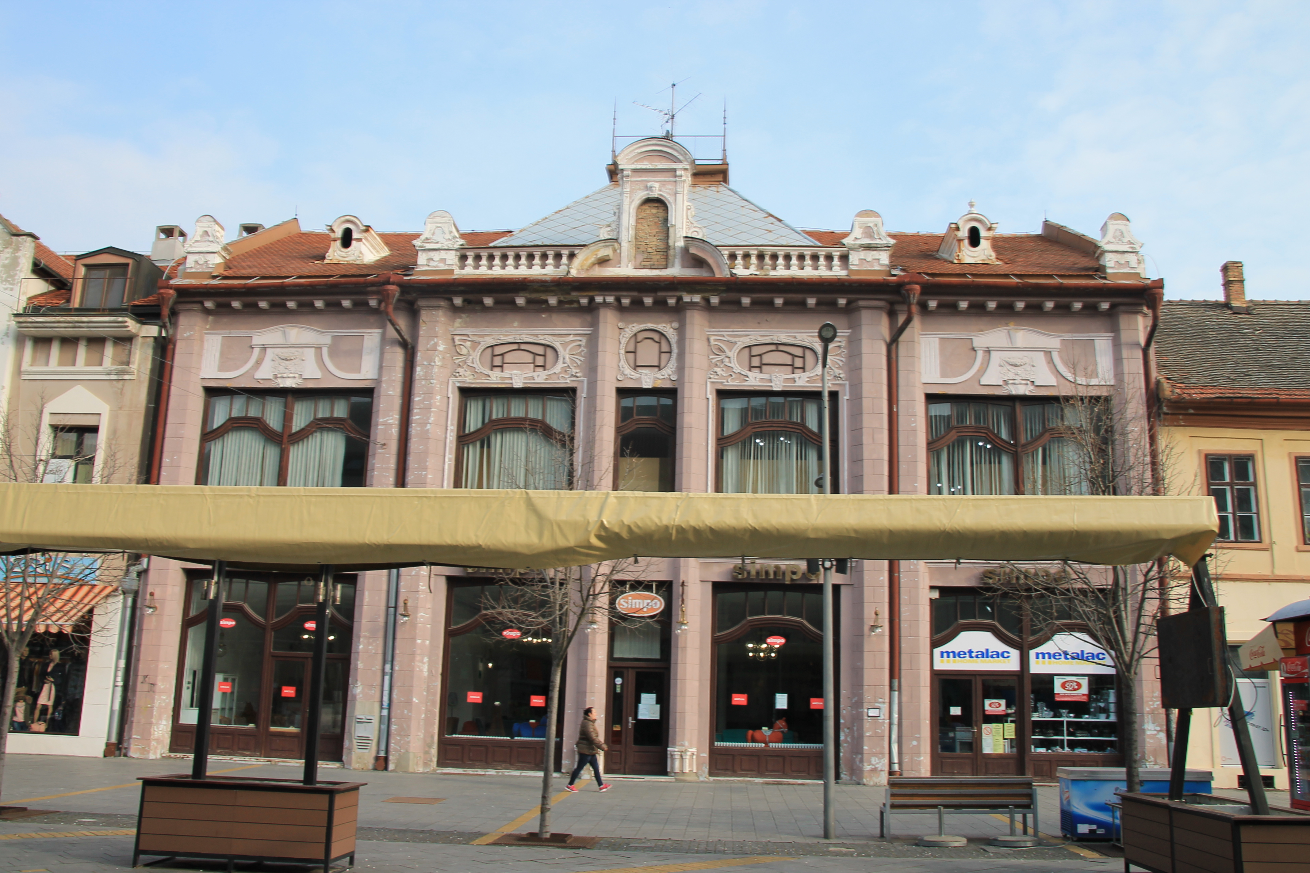 Staro jezgro Zrenjanina